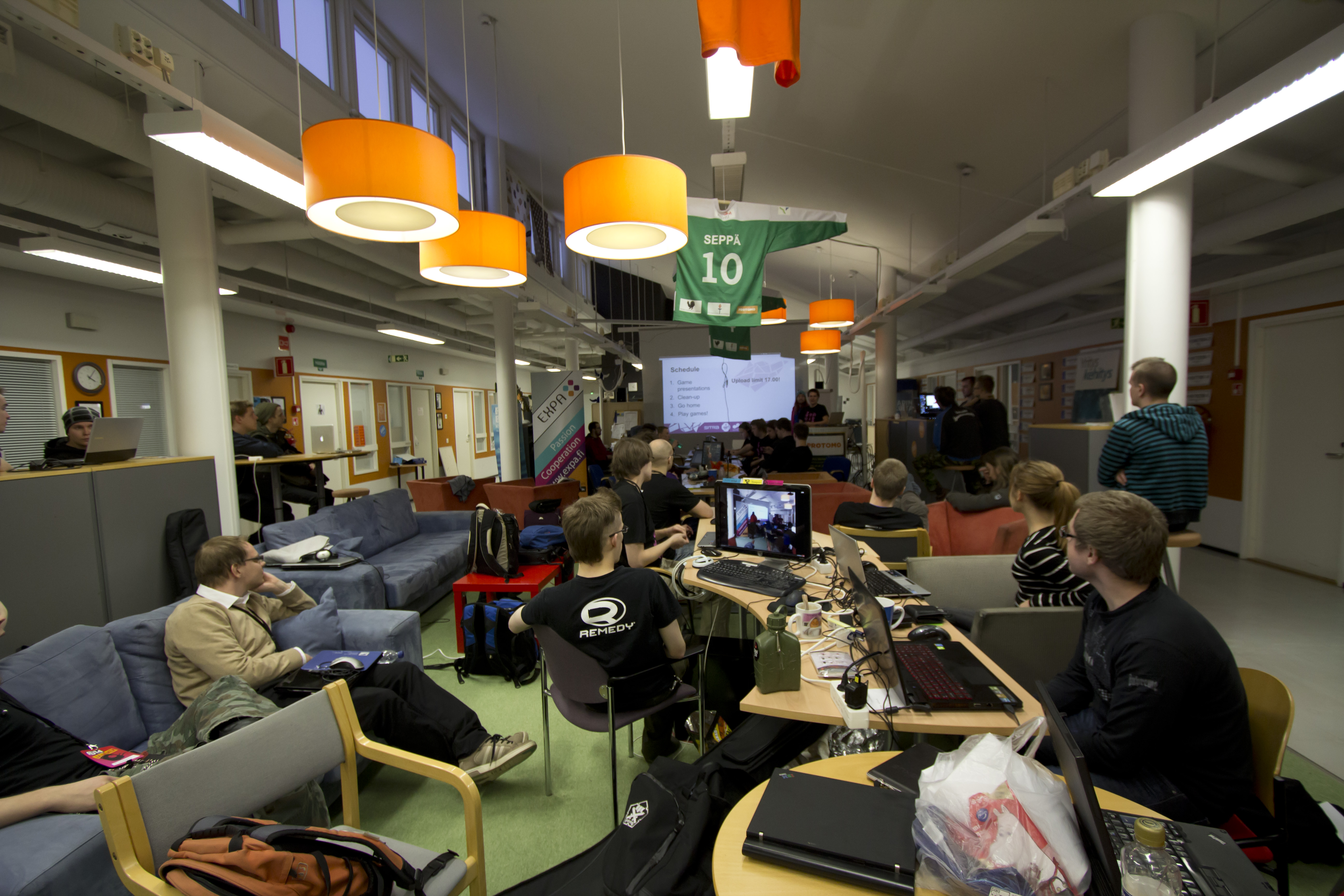 Global Game Jam 2014 Jyväskylä, Finland